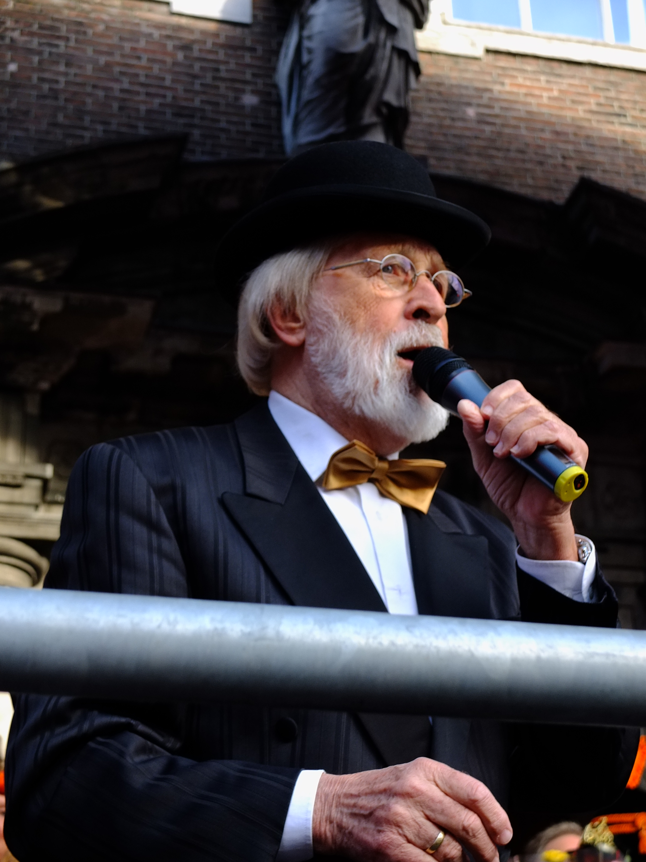 Vader Abraham tijdens carnaval op de grote markt in Breda